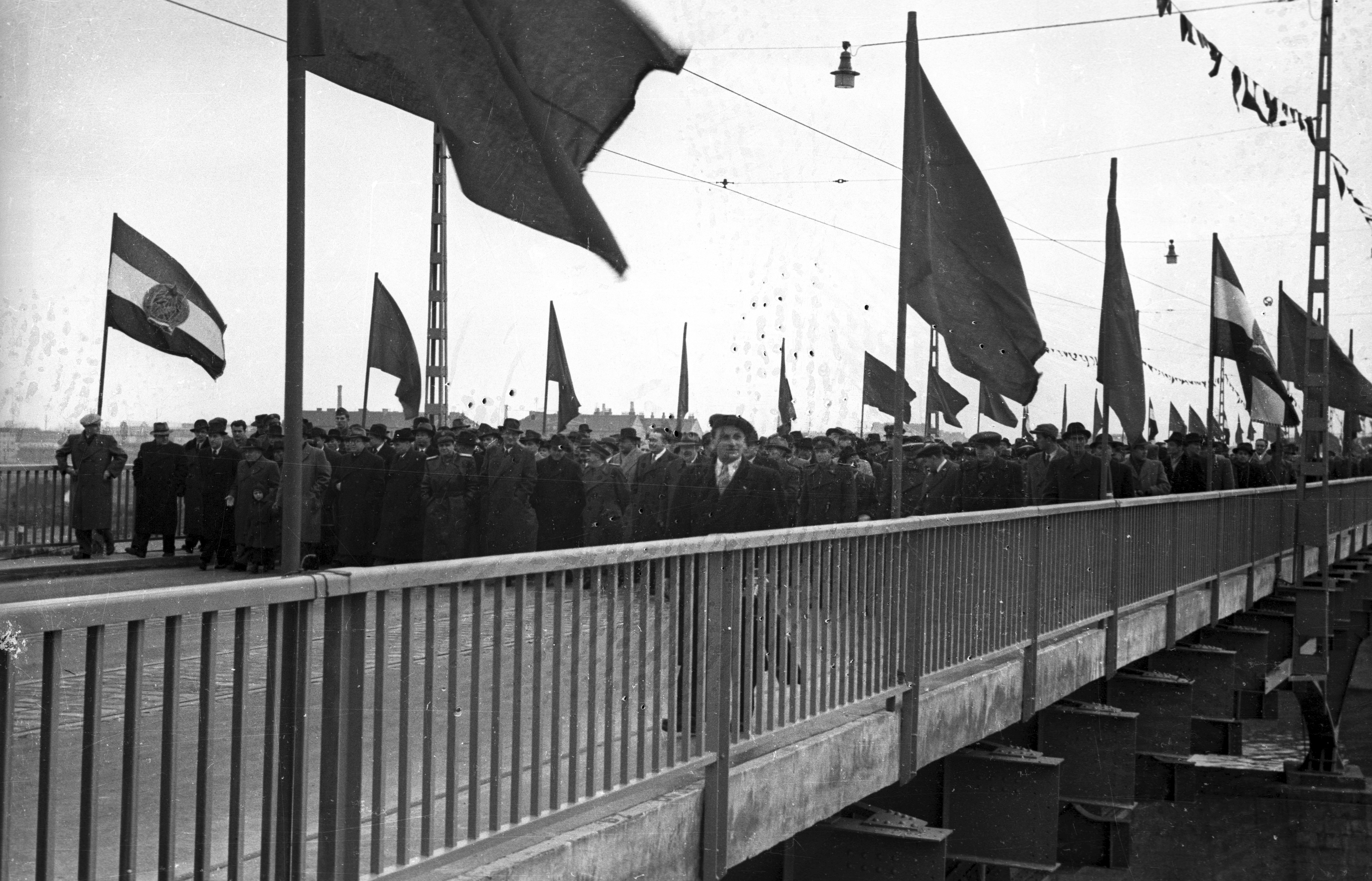 a felvétel az Árpád (Sztálin) híd avatásakor készült, a háttérben a Népfürdő utcai házak teteje látszódik. Location: Hungary, Budapest XIII. Tags: Budapest Title: a felvétel az Árpád (Sztálin) híd avatásakor készült, a háttérben a Népfürdő utcai házak teteje látszódik.